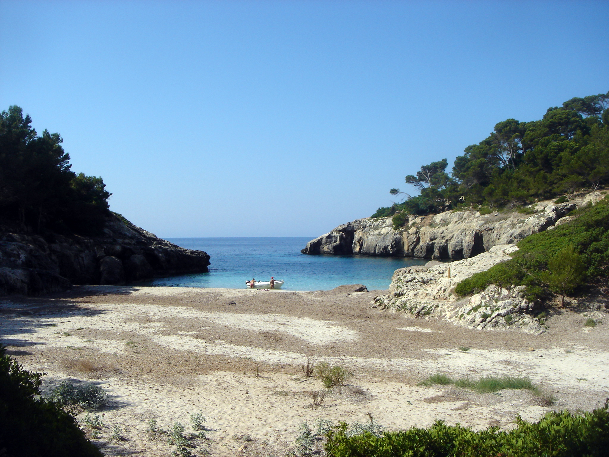 2007 06 30 - Fustam 01